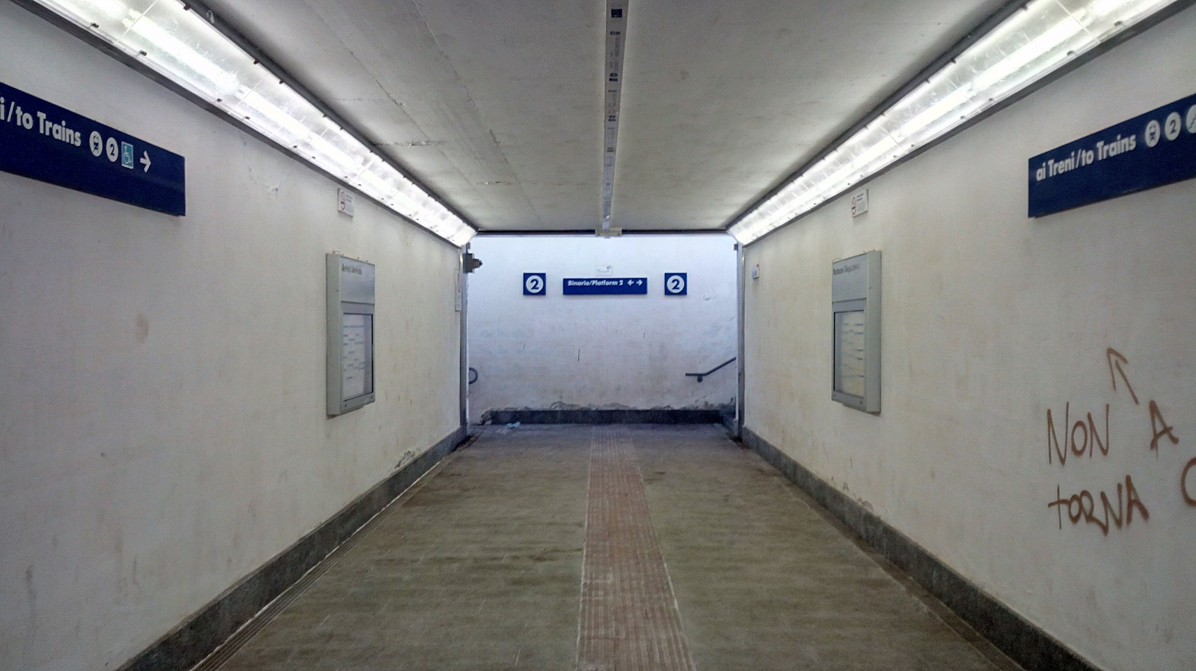 Sottopasso della stazione ferroviaria di Assemini Santa Lucia.